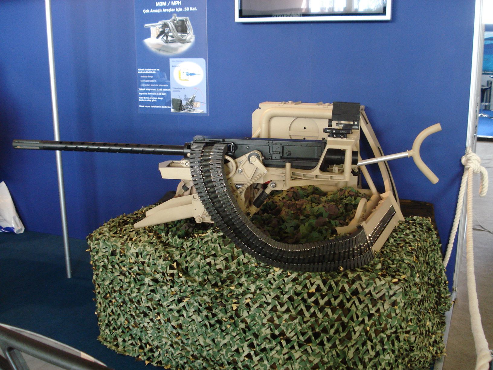 IDEF '07 Savunma Fuarı'nda çekildi.M3MMPH makineli tufek. 23 Mayıs 2007